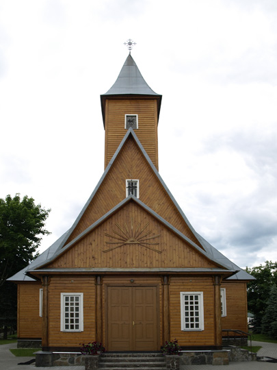 Varėnos_šv._arkangelo_Mykolo_bažnyčia